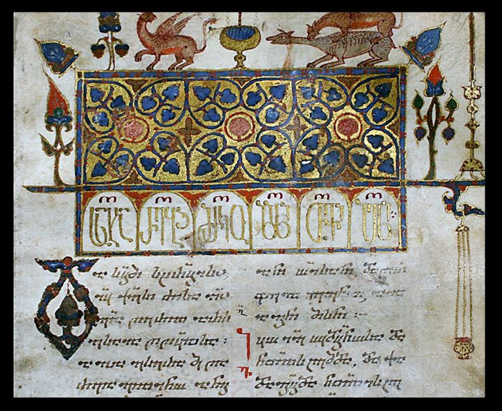 Motsameta Gospel